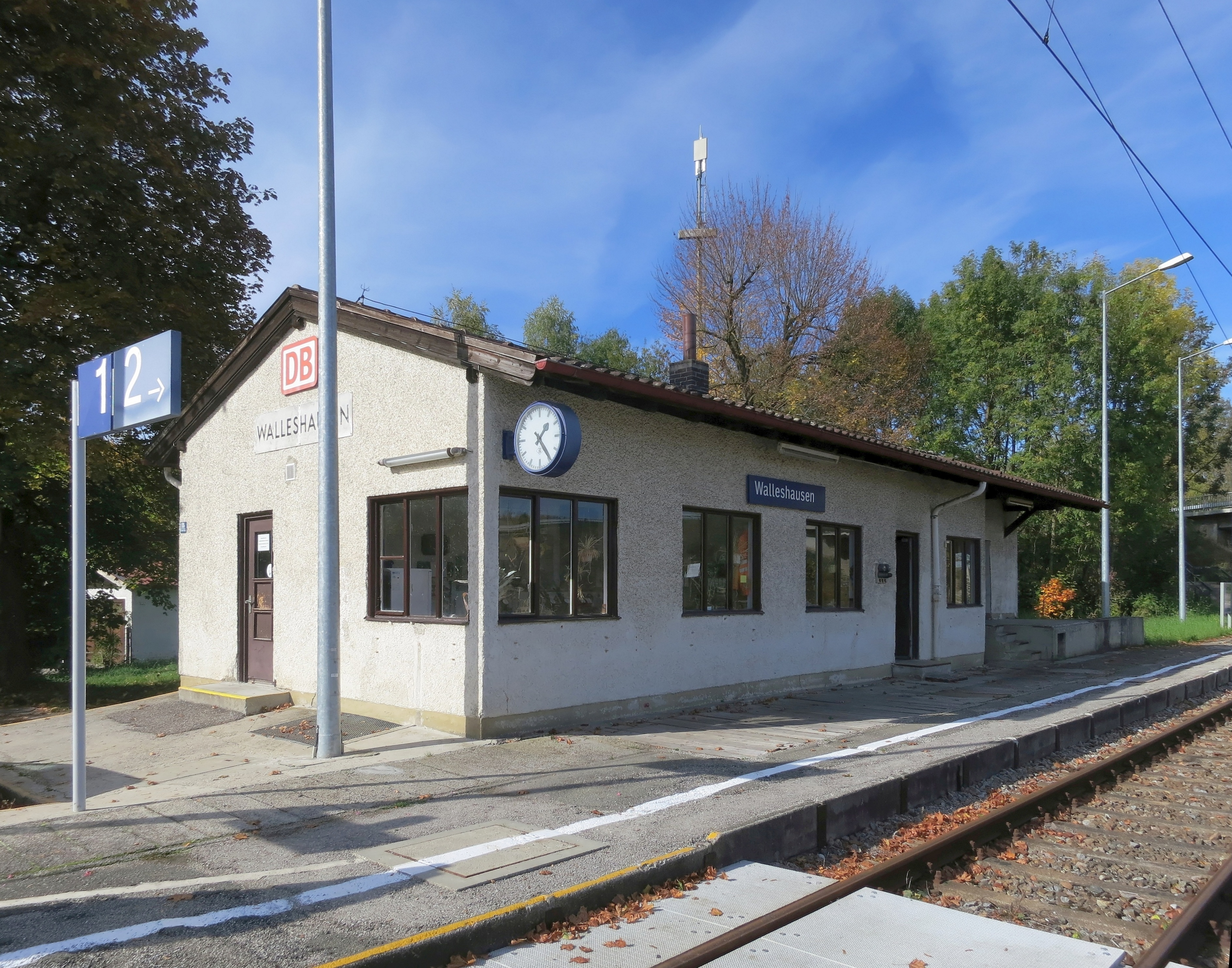 Empfangsgebäude des Bahnhofs Walleshausen an der Ammerseebahn von der Gleisseite